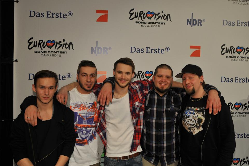 Roman Lob (mitte) mit seiner Band Rooftop Kingdom nach dem Finale von "Unser Star für Baku"